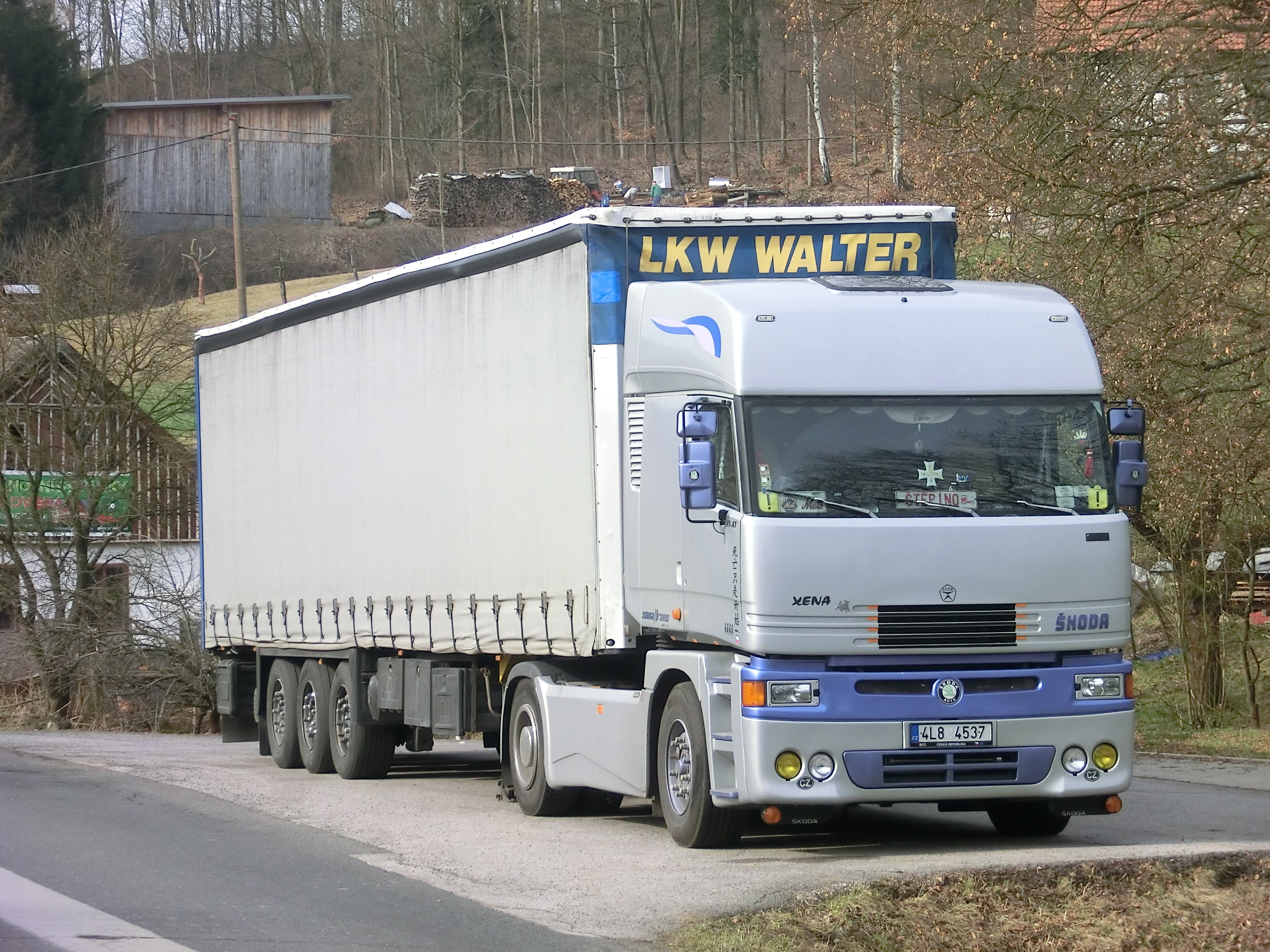 Návěsový tahač Škoda Xena (typová řada LIAZ 400), typové označení 19.47 TBV. Dopravce pan Chlum, Dolní Sytová.